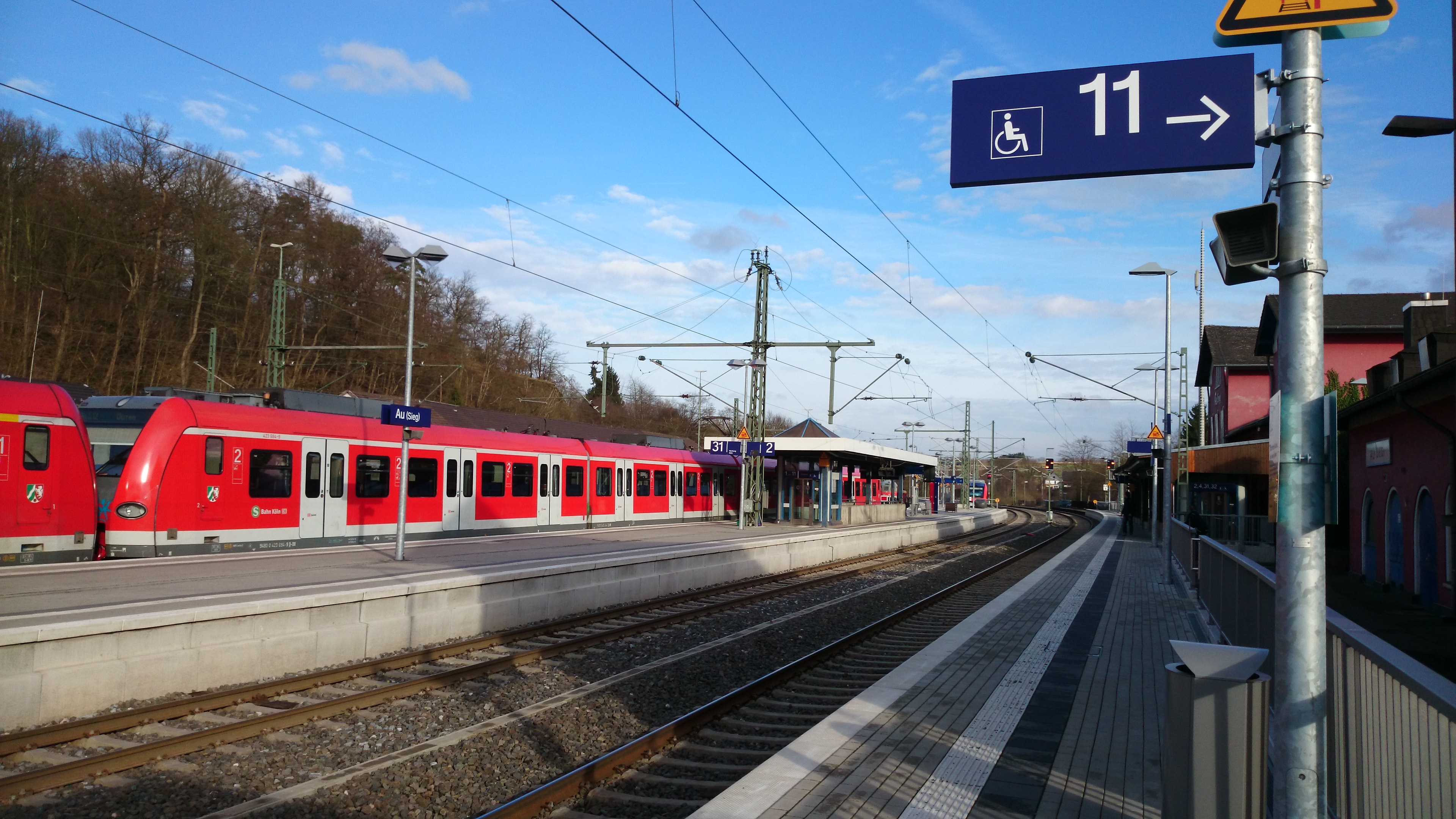 Die Gleise des Bahnhofs Au (Sieg) mit dem Hinweisschild auf das Gleis 11, von dem die Züge in Richtung Altenkirchen starten. (2014)